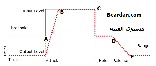 الشكل يبين المخطط البياني لإشارة الدخل باللون الازرق Input Level مع اشارة الخرج باللون الاحمر Output level